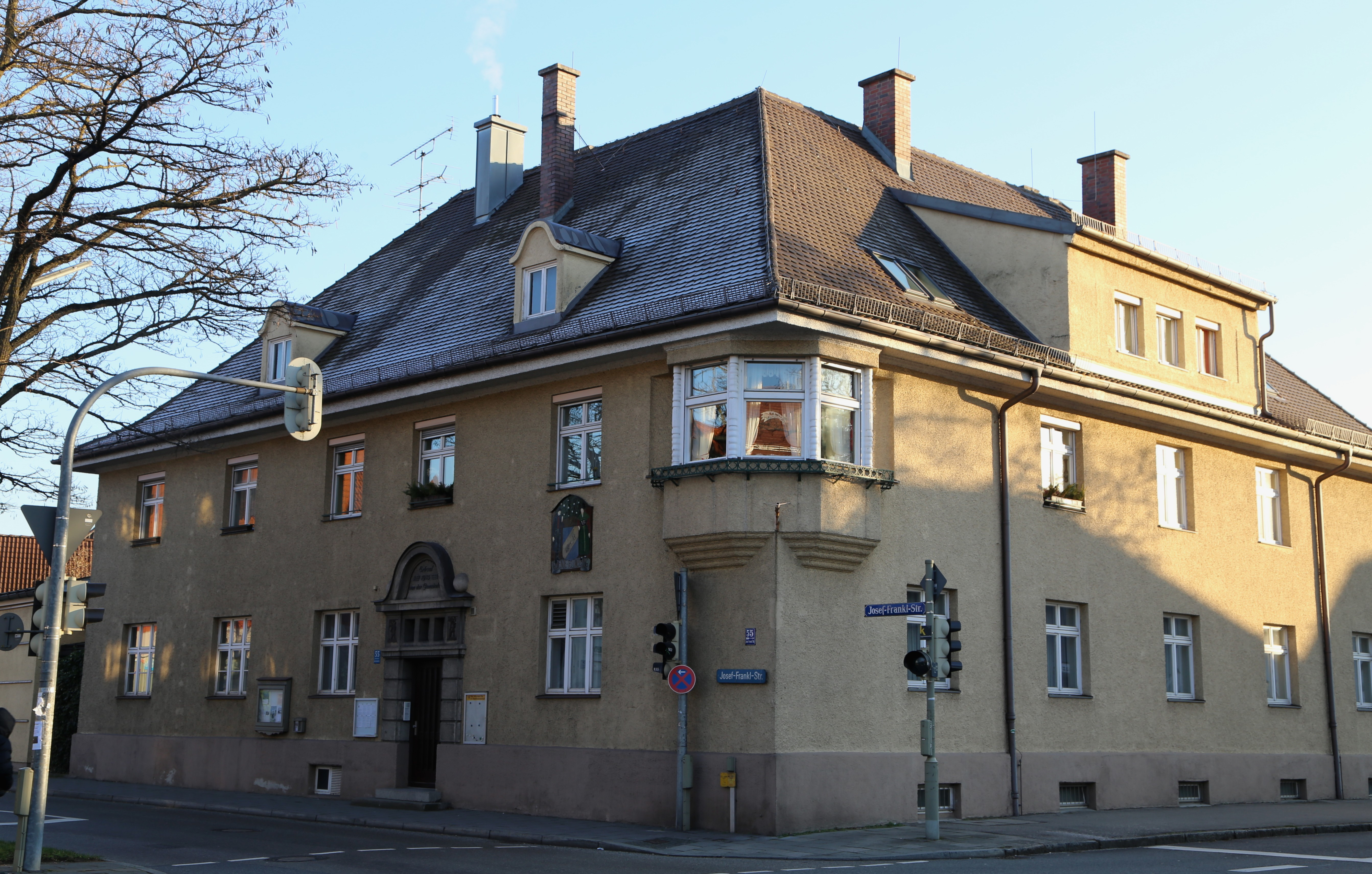 Josef-Frankl-Straße 55, Feldmoching, München; ehemaliges Rathaus von Feldmoching, zweigeschossiger historisierender Walmdachbau in Ecklage mit polygonalenen Eckerkern und steinernem Portal, bez. 1913.